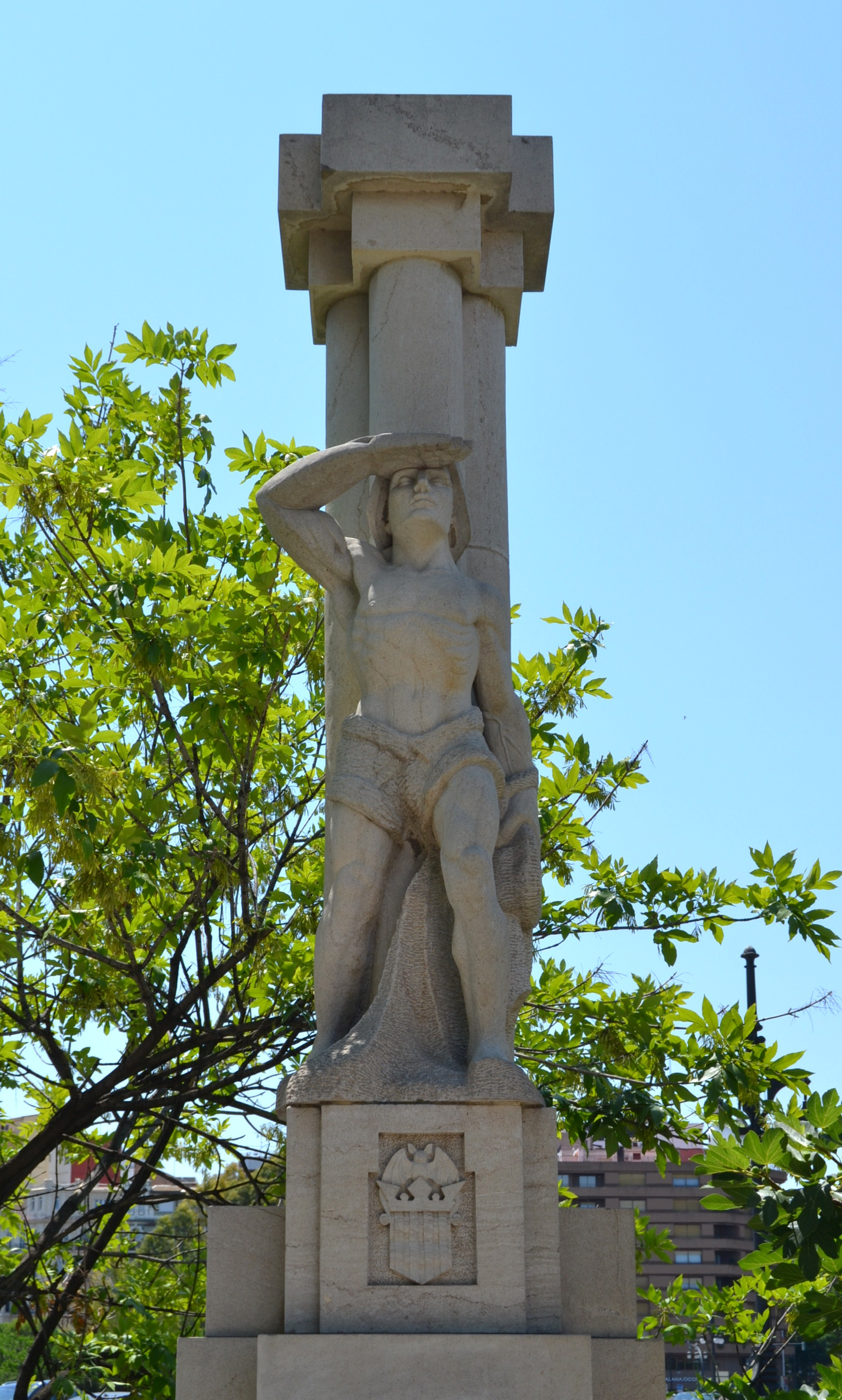 Estàtua del pont d'Aragó de València, pescador.